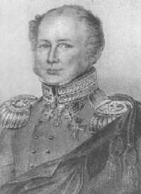 Peter von Scholten, 1784-1854